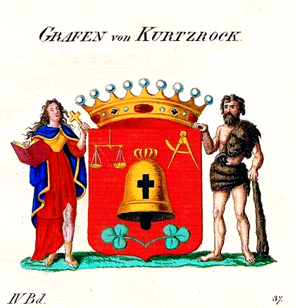 Wappen der Grafen von Kurtzrock (erbländisch-österreichischer Grafenstand 1819)